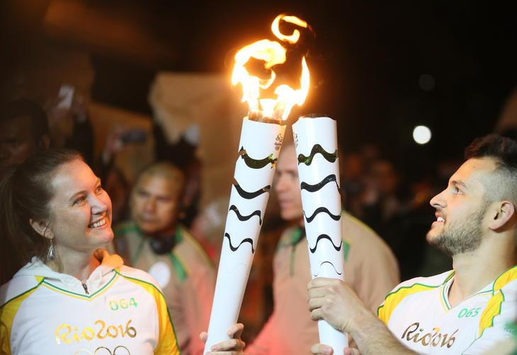 "Beijo da Tocha": passagem do fogo olímpico entre as tochas, durante a passagem do revezamento da tocha em Porto Alegre/RS